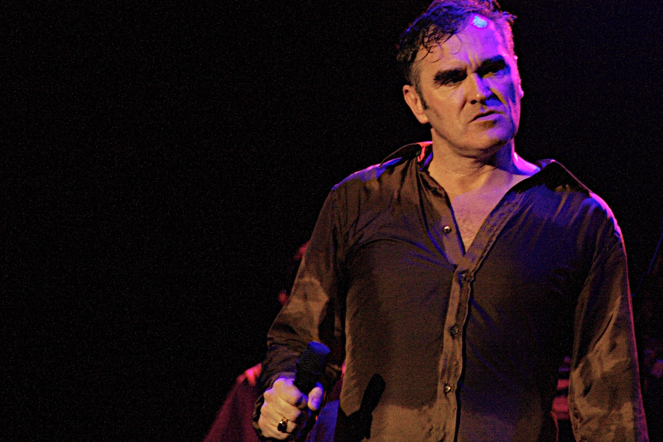 morrissey at la zona rosa